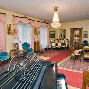 Teresia ja Rafael Lönnströmin kotimuseo